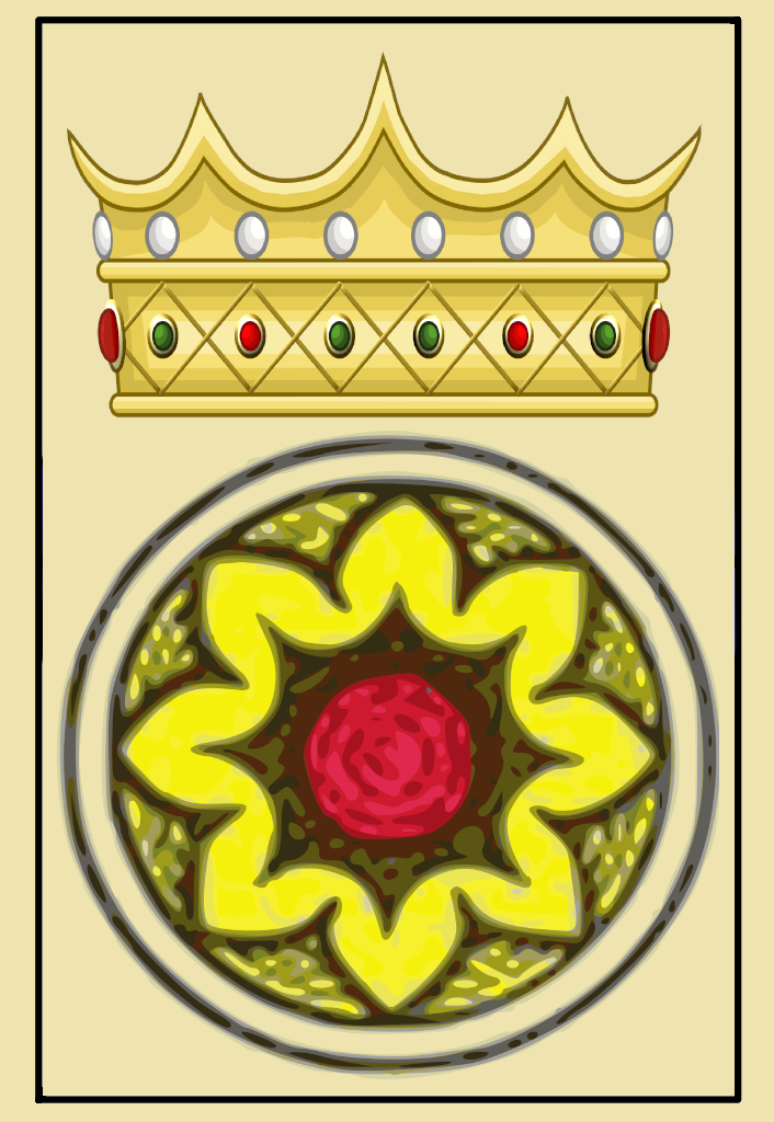 Tarot Moneta